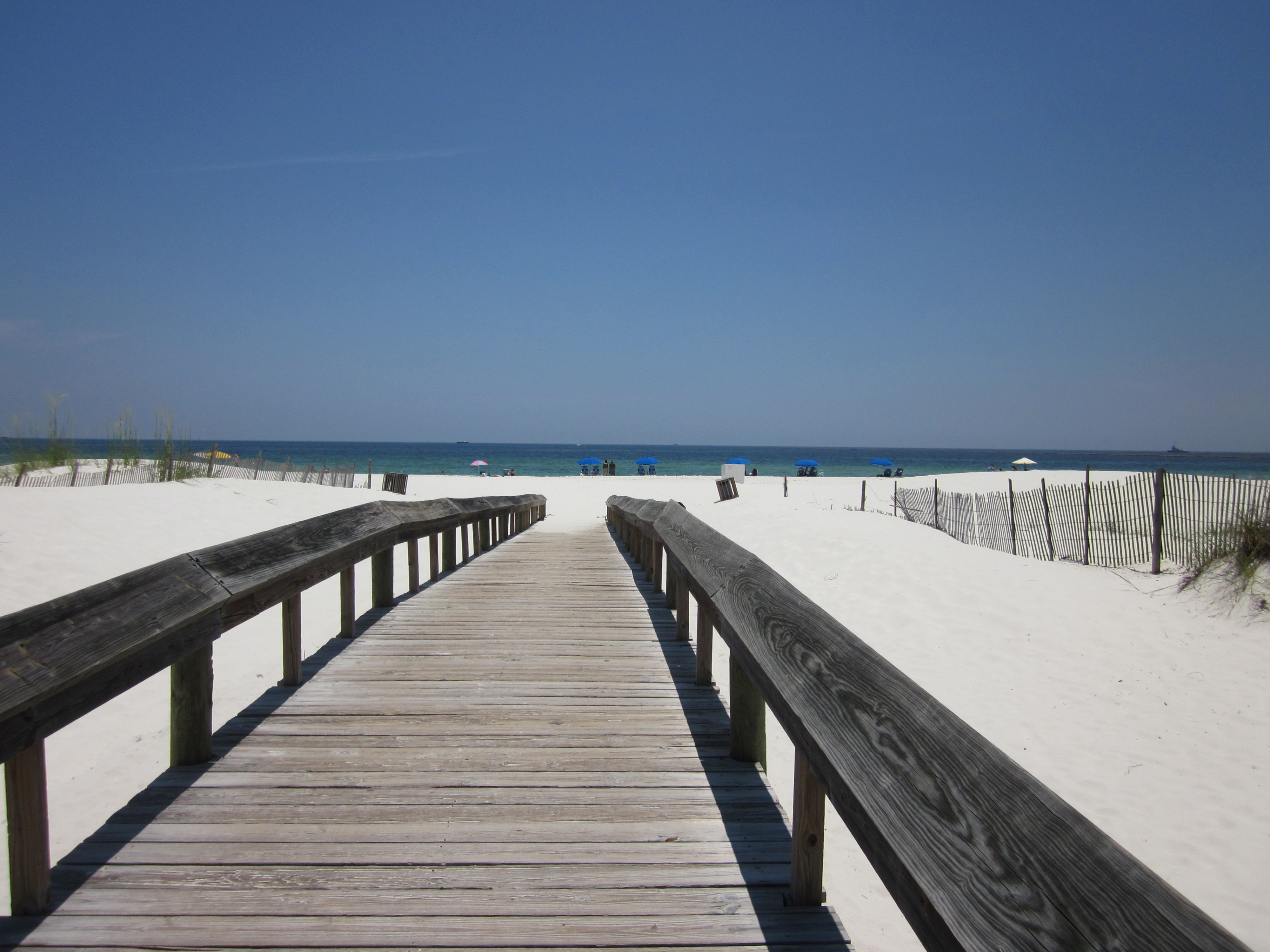 Orange Beach, Alabama